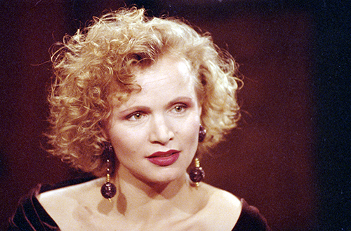 Renée Soutendijk